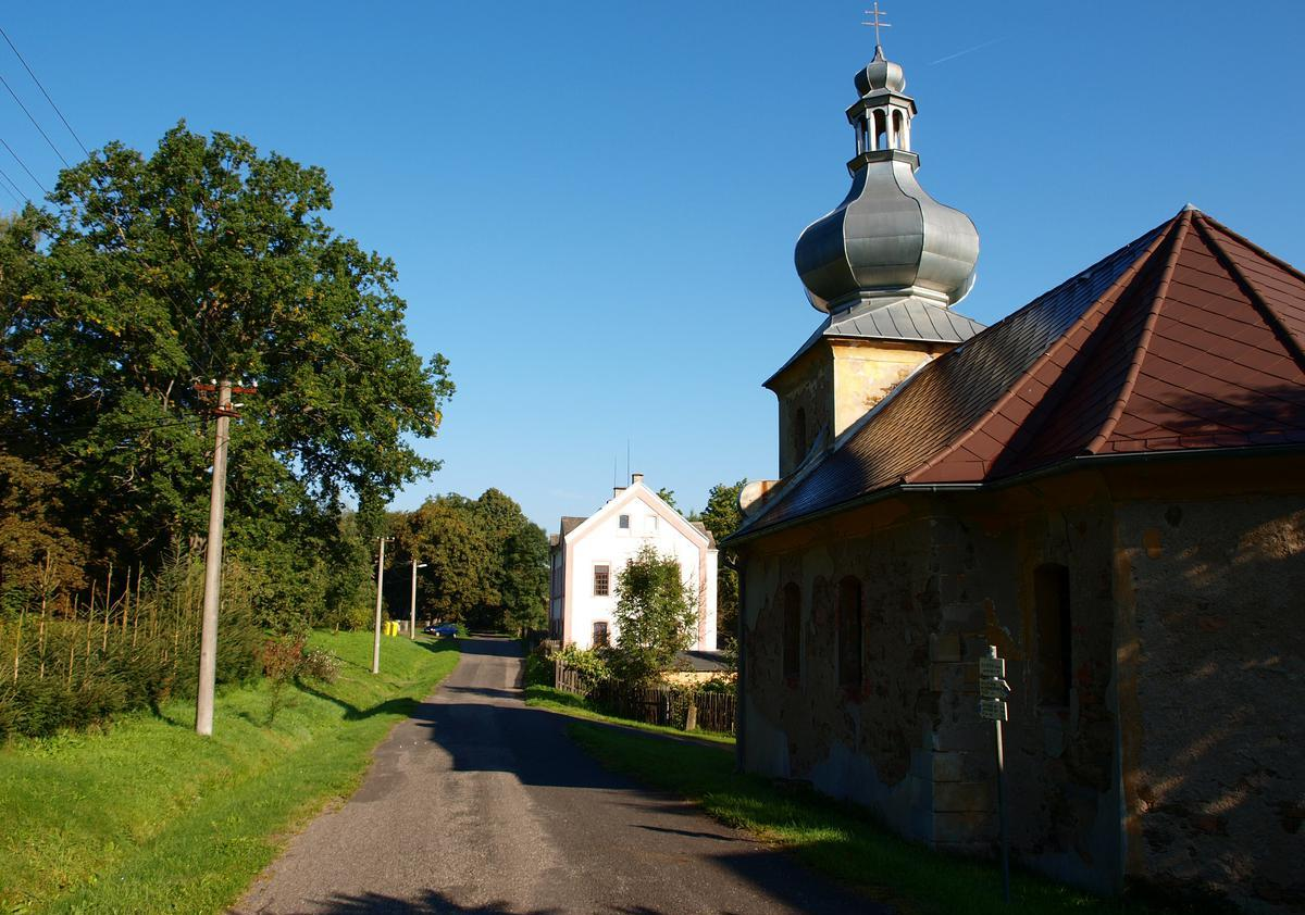 Svinov, okres Karlovy Vary